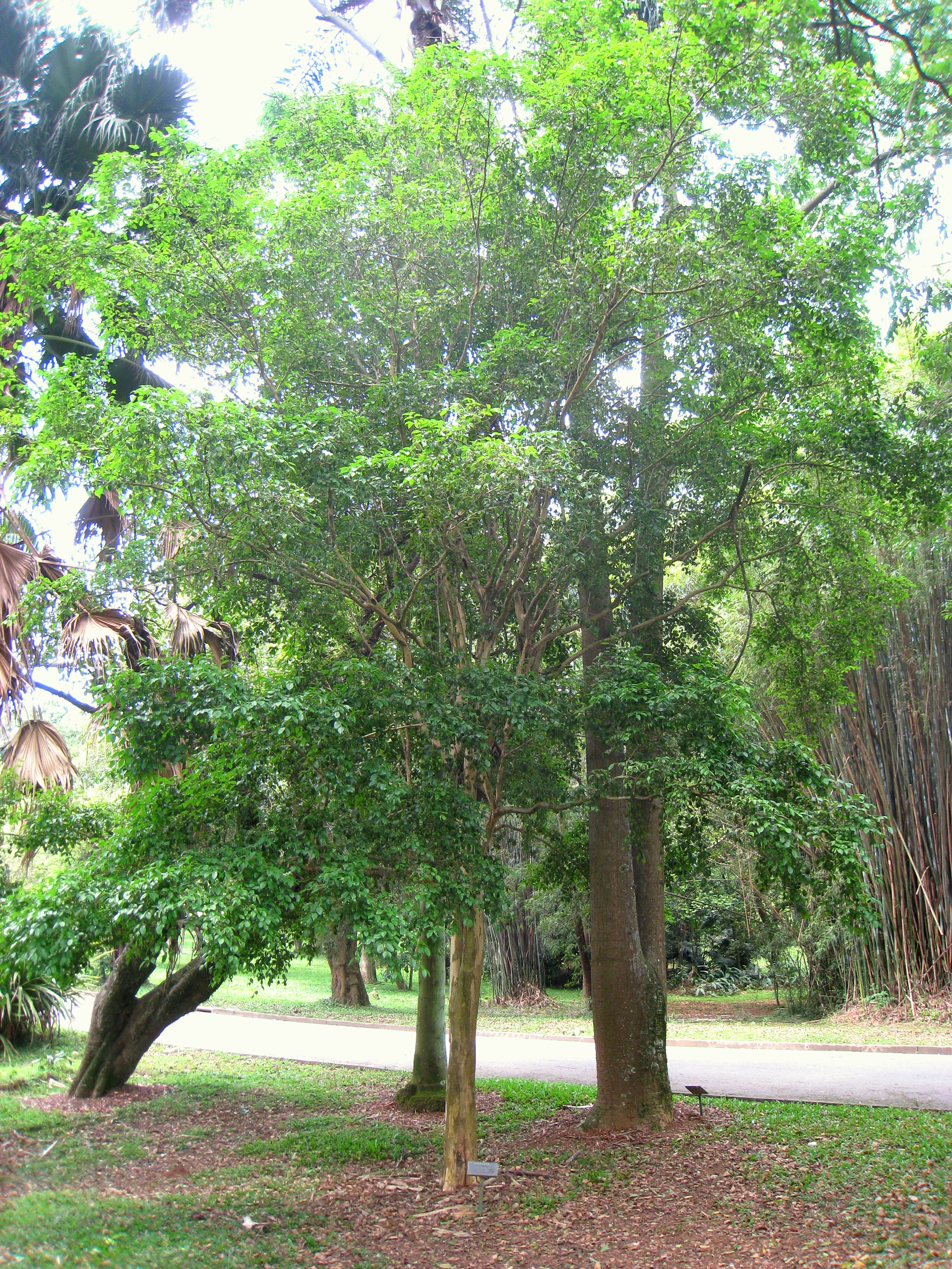 Eugenia uniflora in the Jardim Botânico de São Paulo, São Paulo City, SP, Brazil.